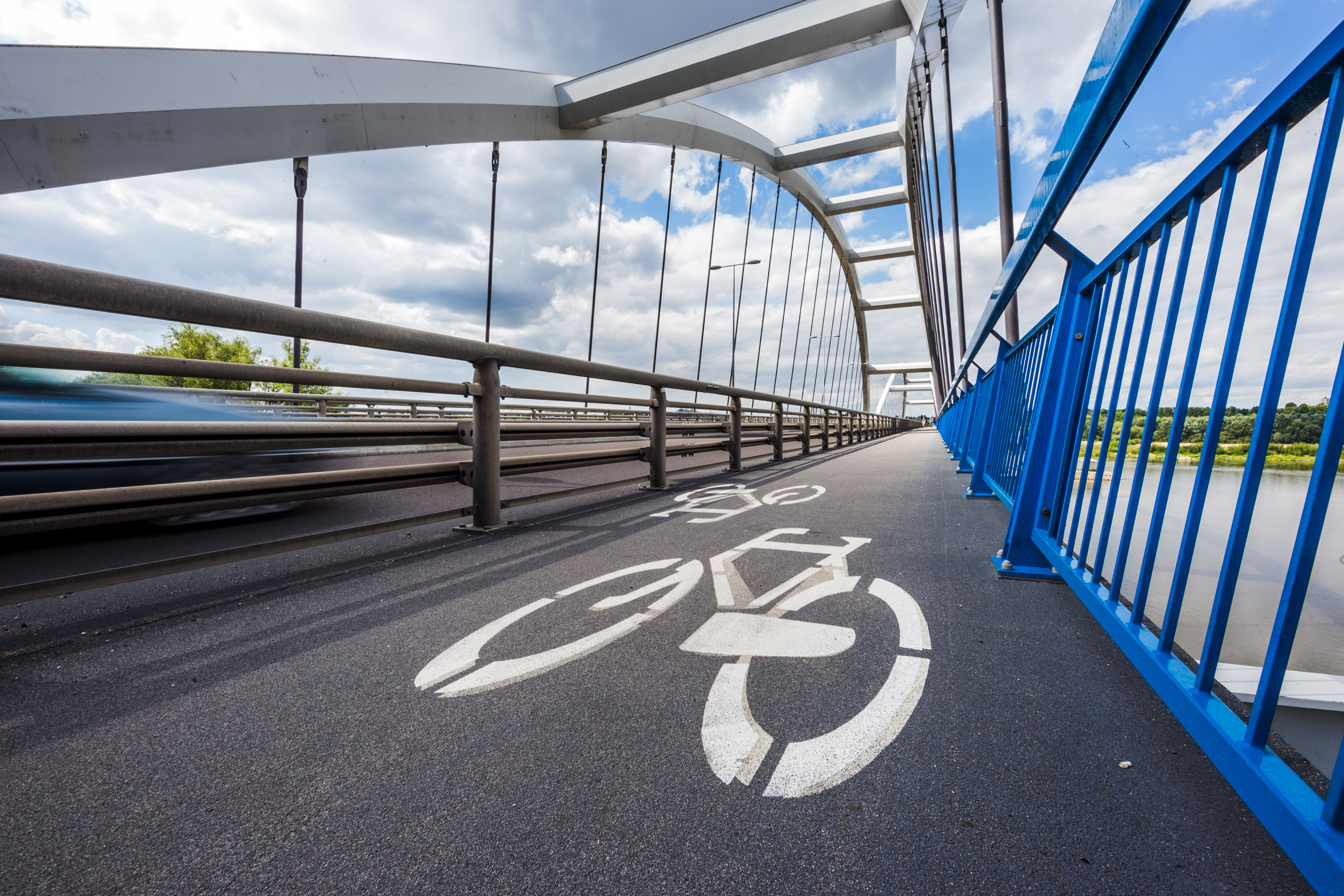 Most gen. Elżbiety Zawackiej w Toruniu.